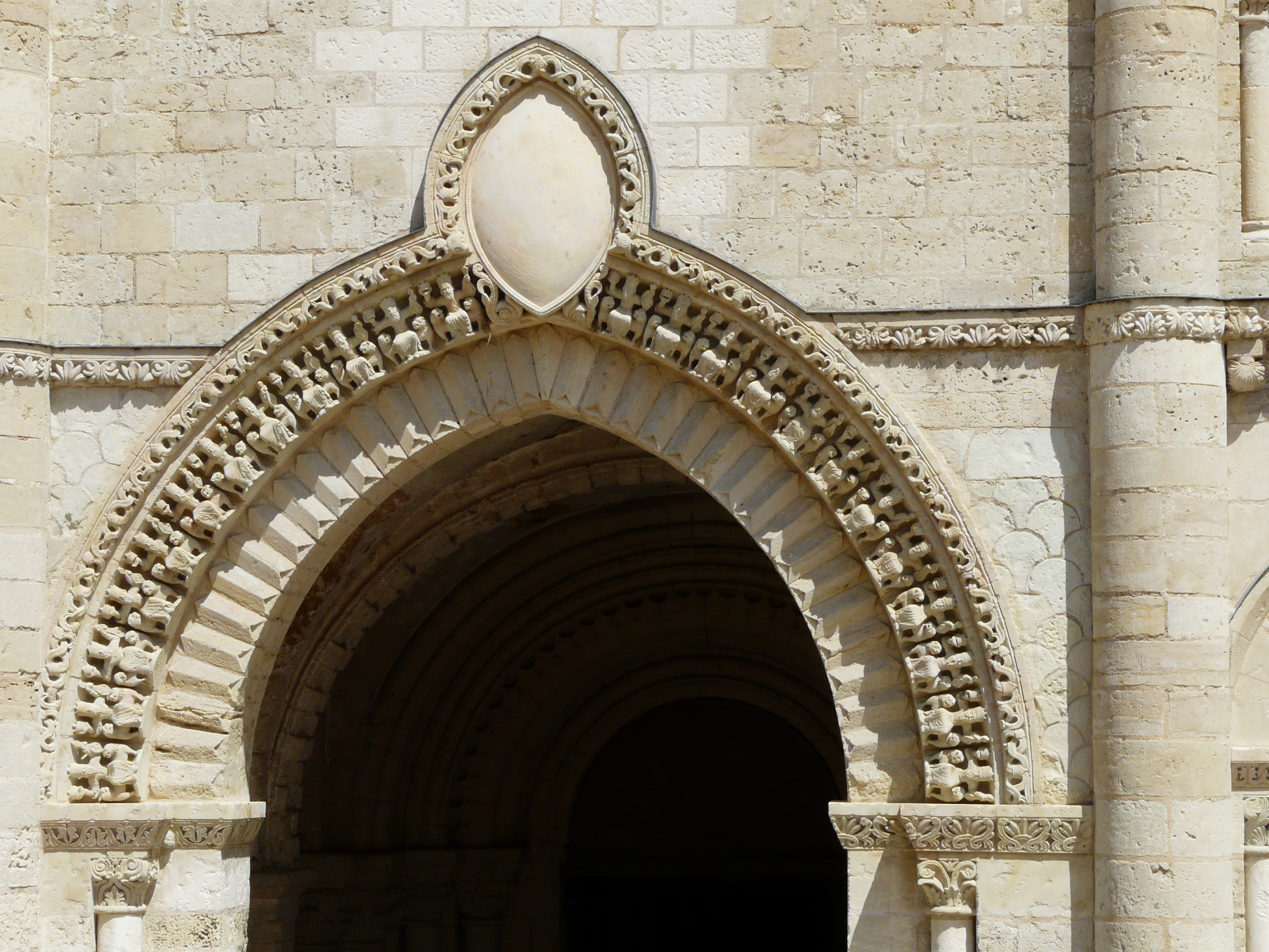 Le portail de l'église abbatiale Saint-Pierre d'Airvault, Deux-Sèvres, France